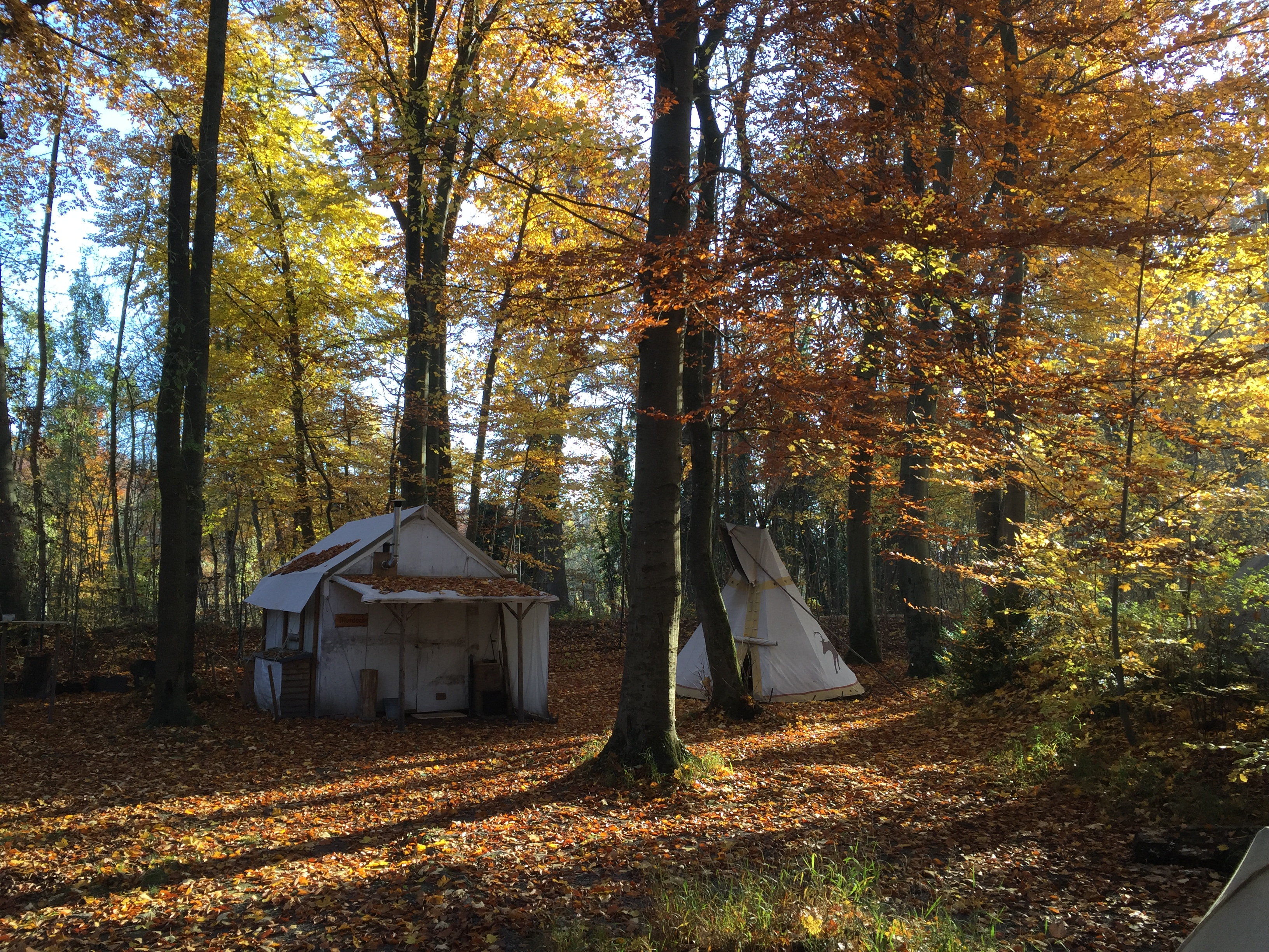 Cowboy-Hütte und Tippi